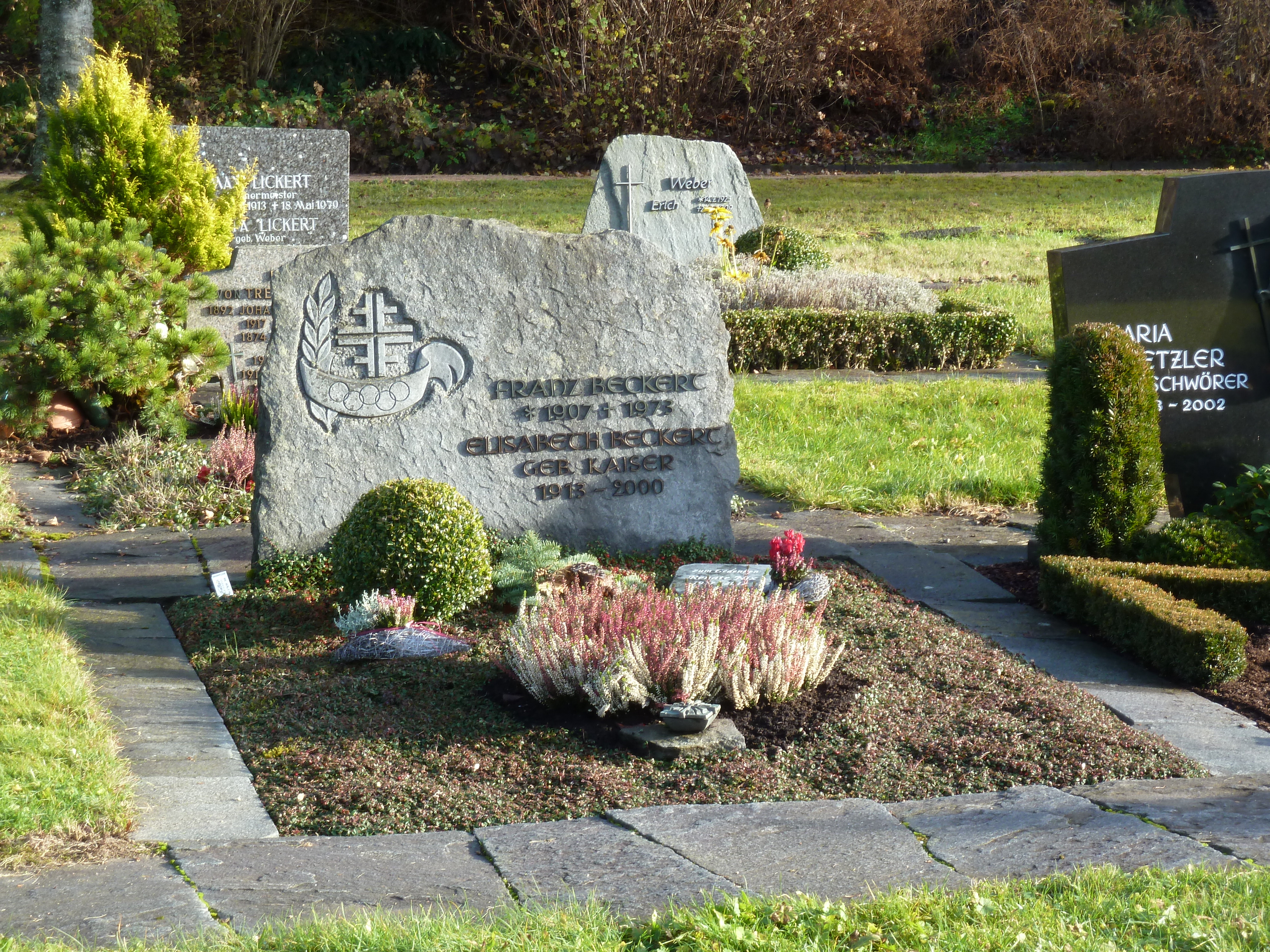 Grab von Franz Beckert in Hinterzarten